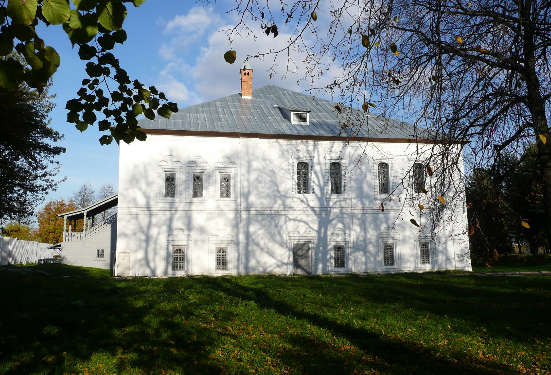 Metropolitan's Palace in Yaroslavl